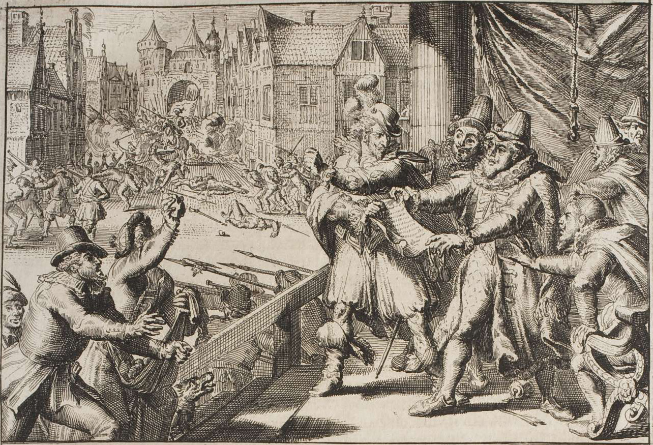 Darstellung des Kampfes um Paderborn 1604